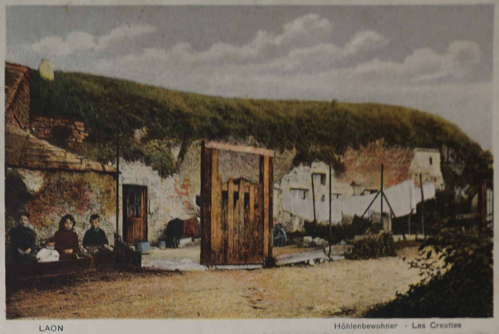 une Cartes postales de Laon.